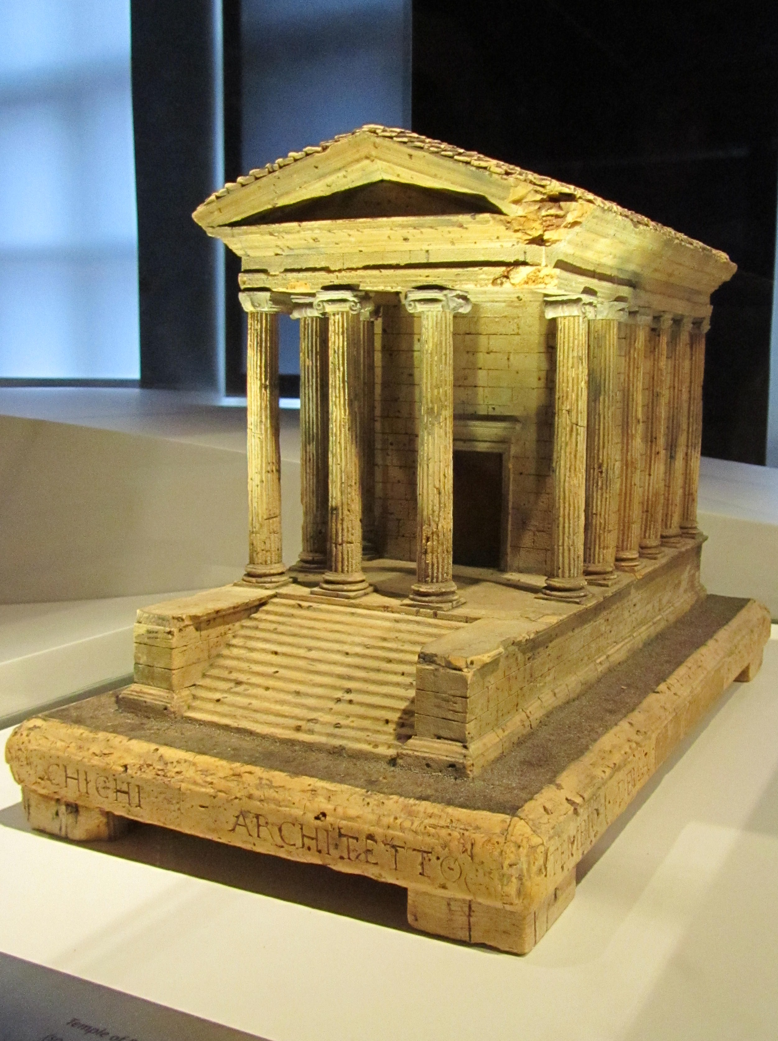 Tempel des Portunus, Modell aus Kork, Antonio Chichi, Rom, 3. Viertel 18. Jahrhundert, ausgestellt im Herzoglichen Museum Gotha (Thüringen).